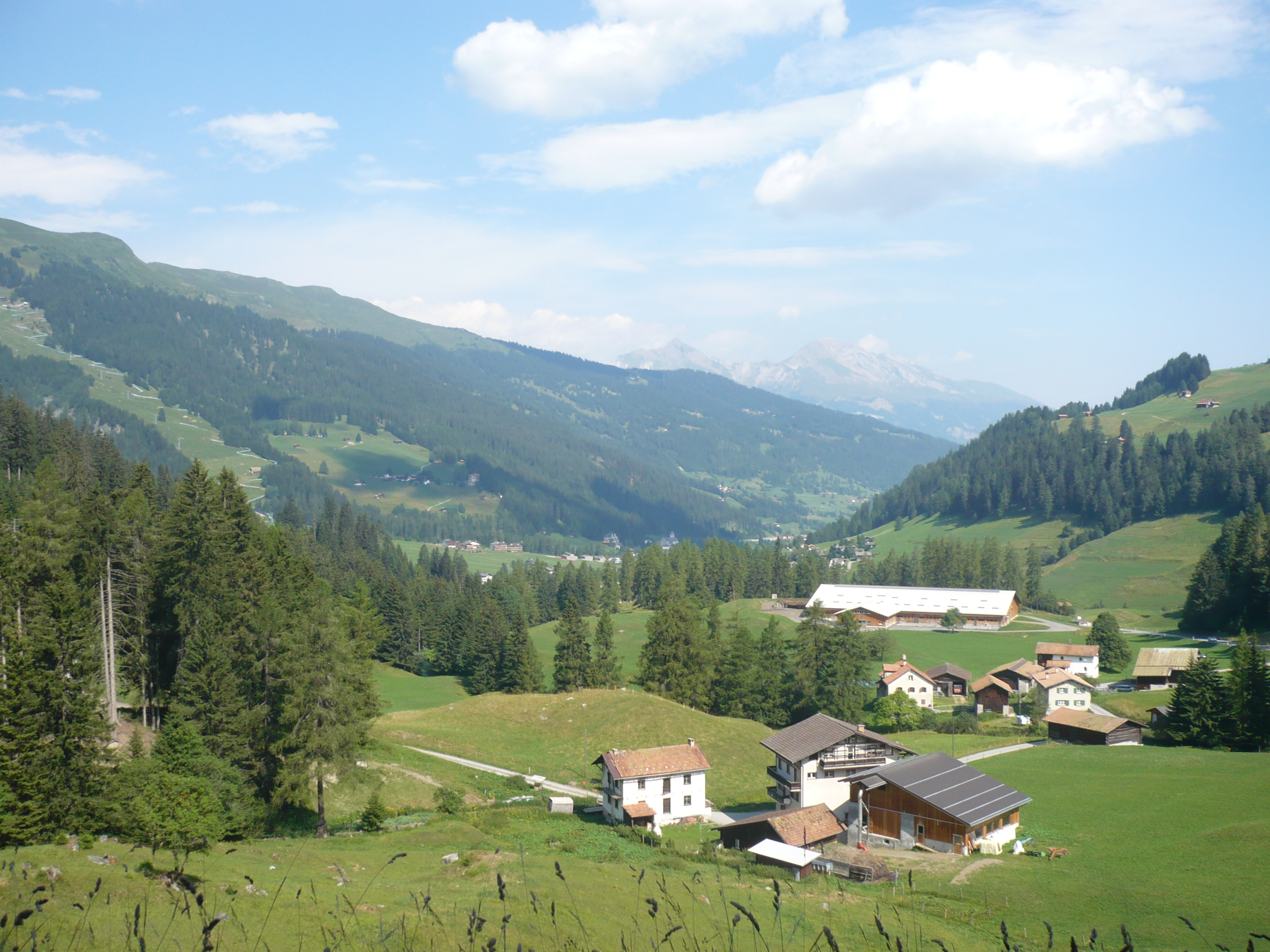 Churwaldental Richtung Norden